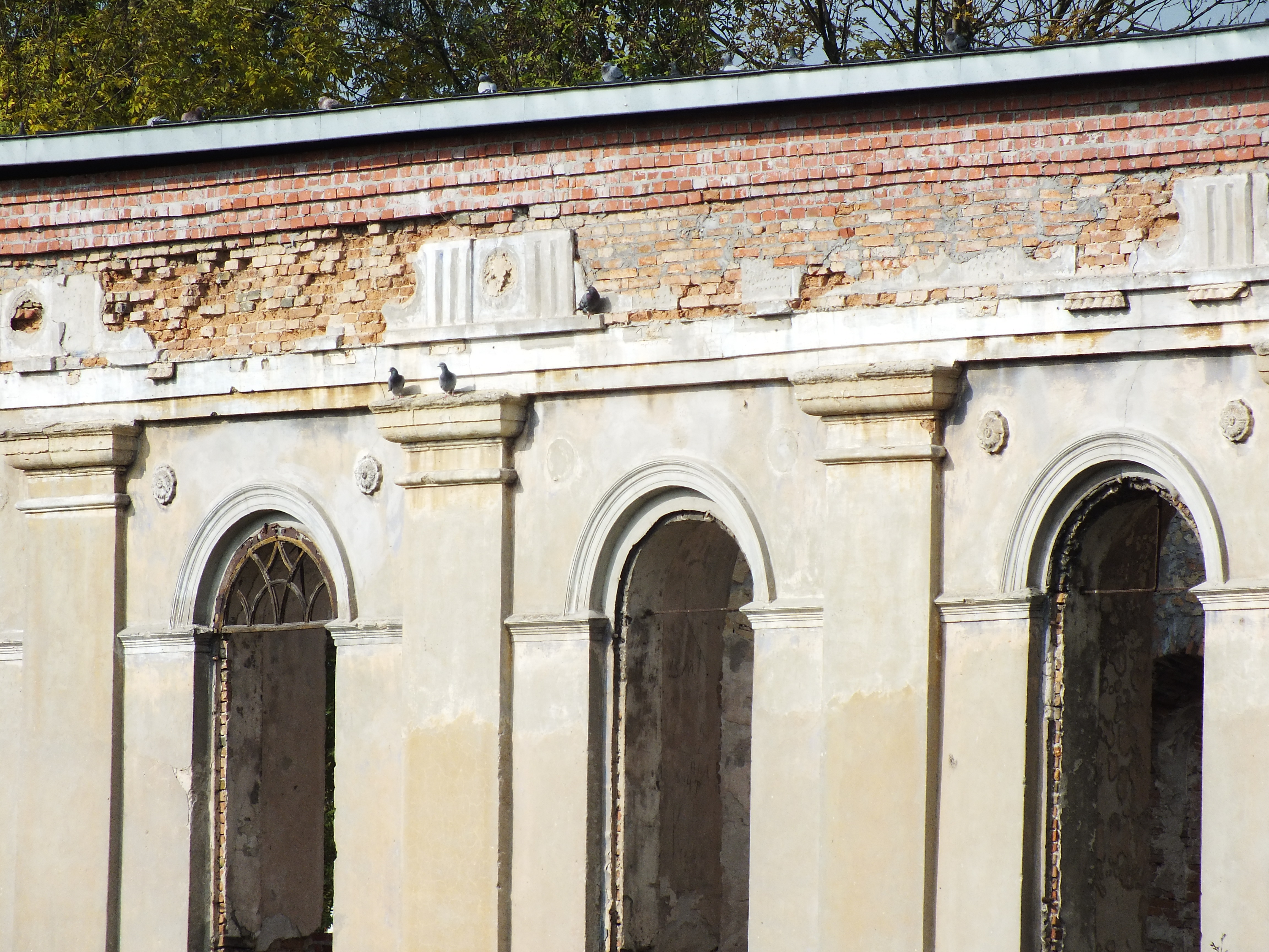 Działoszyce, synagoga, 1852 r.